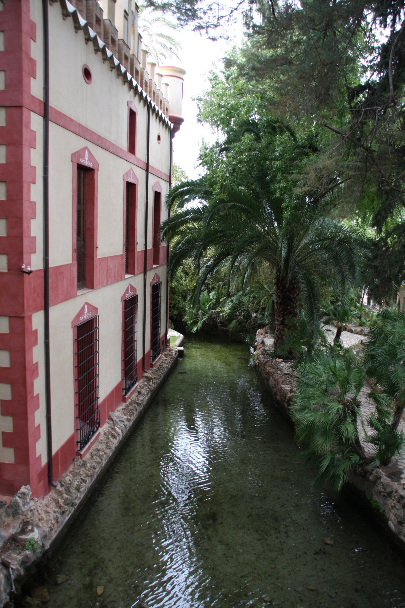 photos by Javier Rodríguez García